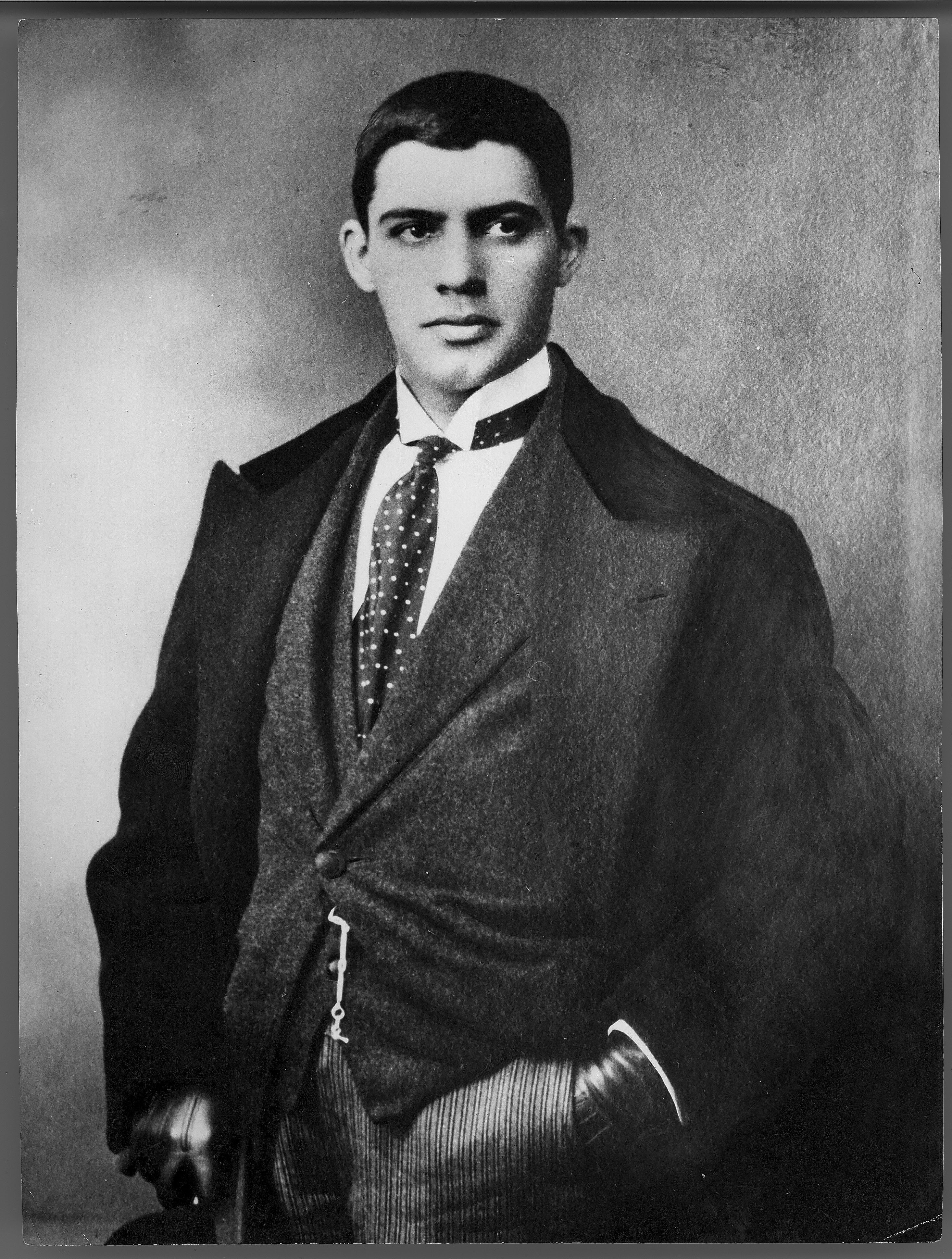 Amadeo de Souza-Cardoso. Fotografia sem data. [ASC01-70 IC]